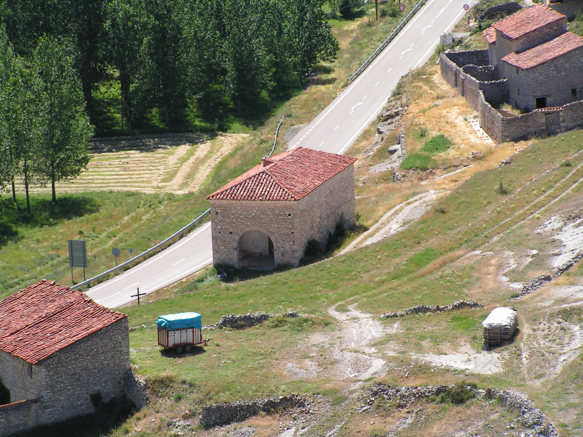 Ermita de Santa Bárbara des del castell